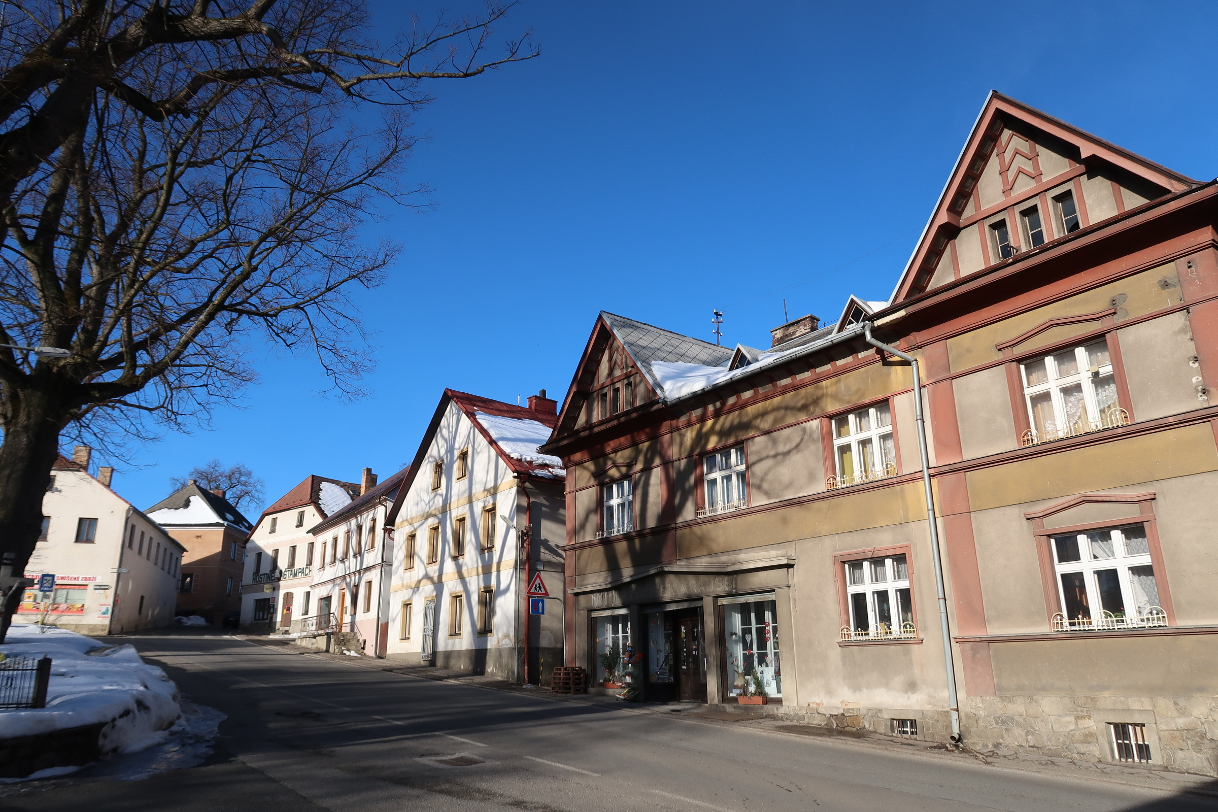 Stachy, náměstí